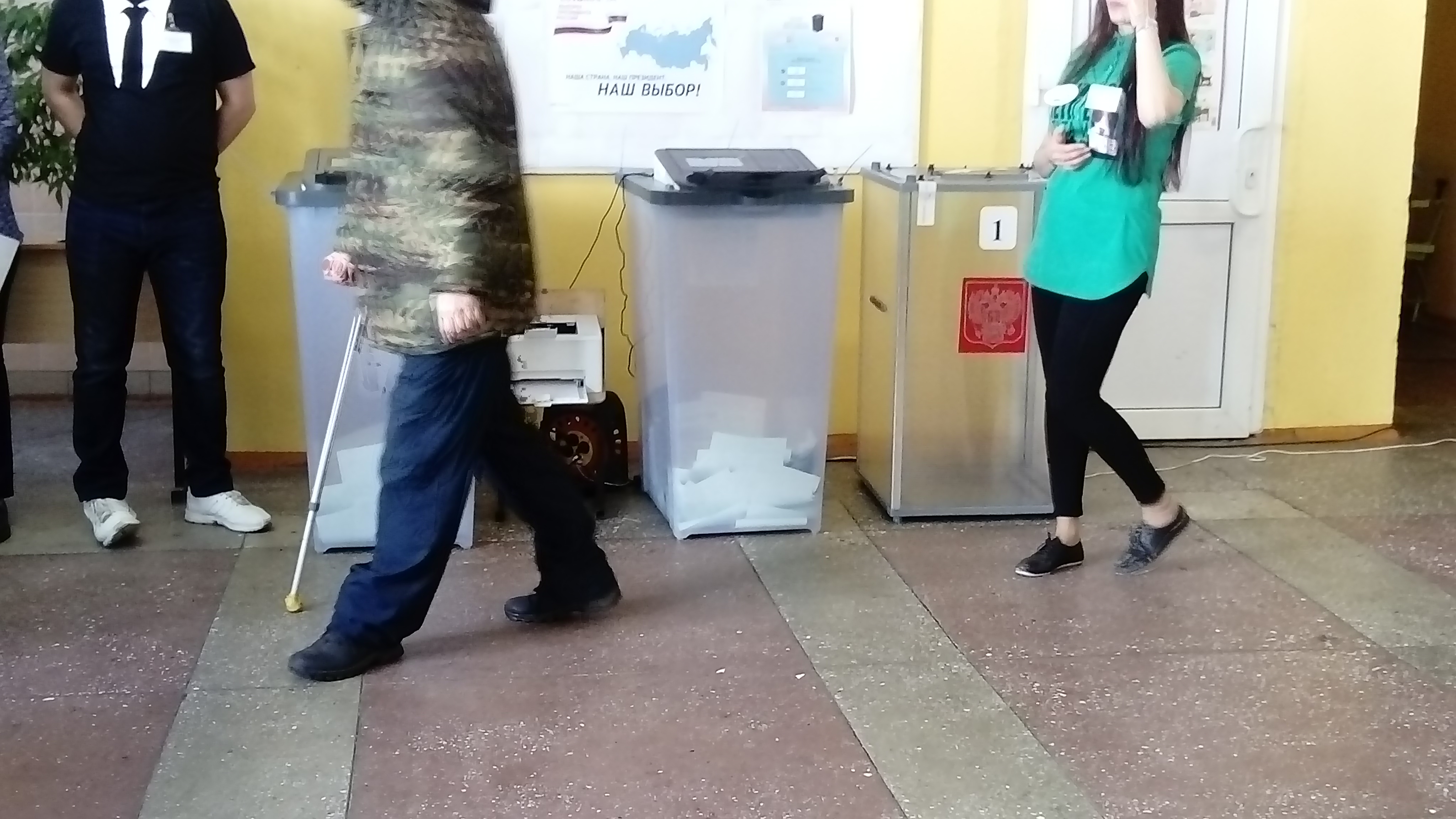 Урна выборы президента России 2018. Петропавловск-Камчатский, участок 41 (территория школы 40)